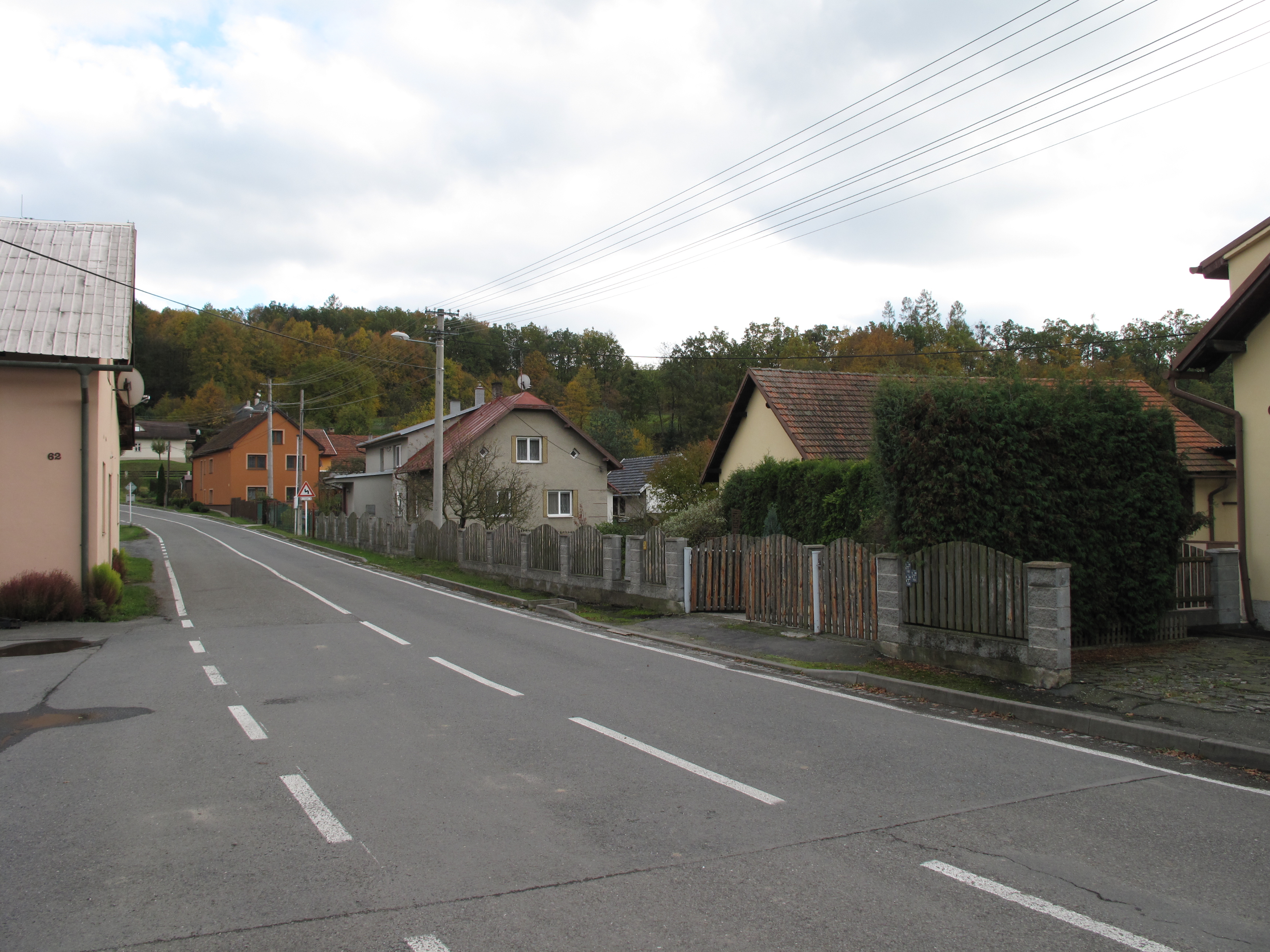 Lukavec (Fulnek). Okres Nový Jičín, Česká republika.